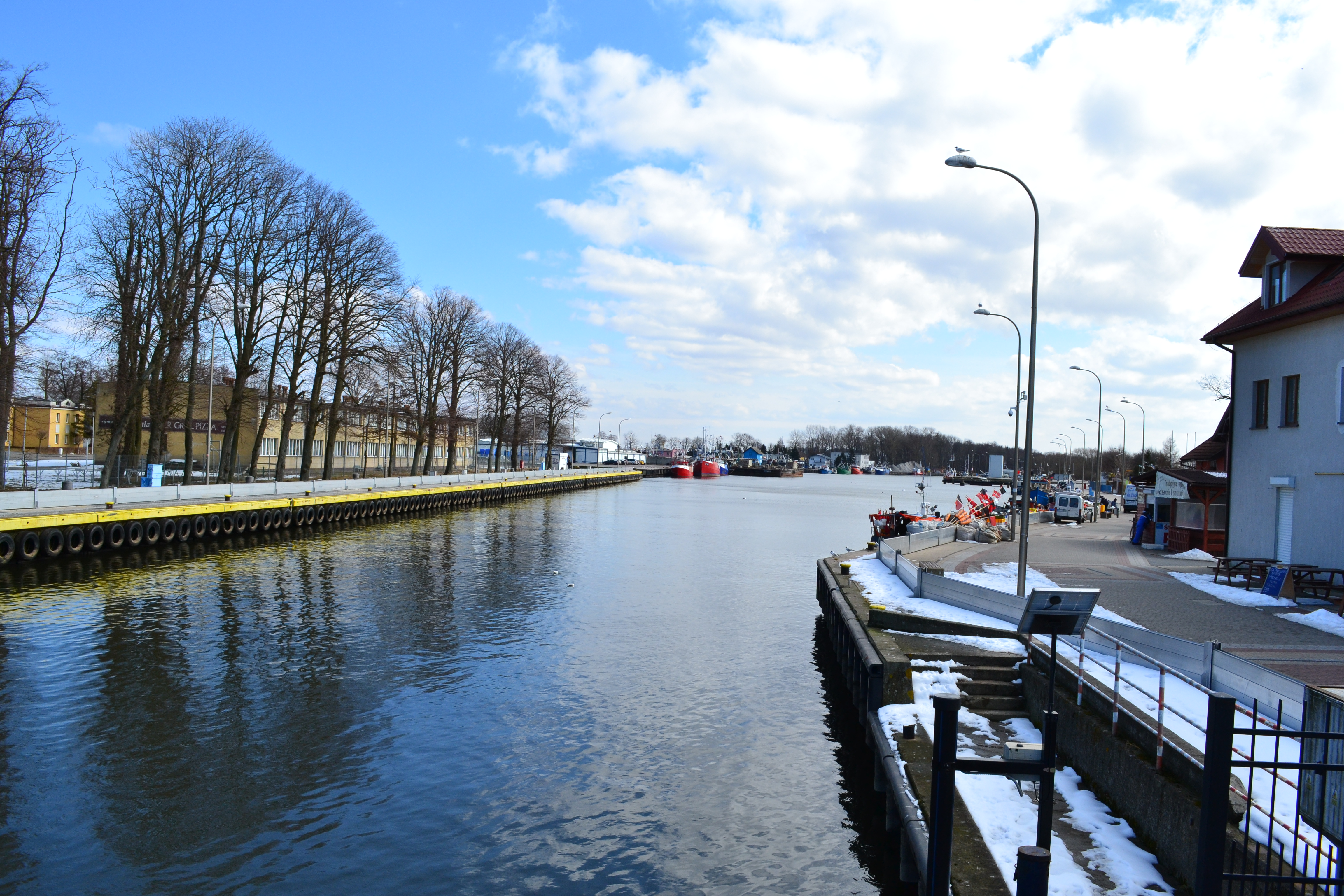 Port w Darłowie